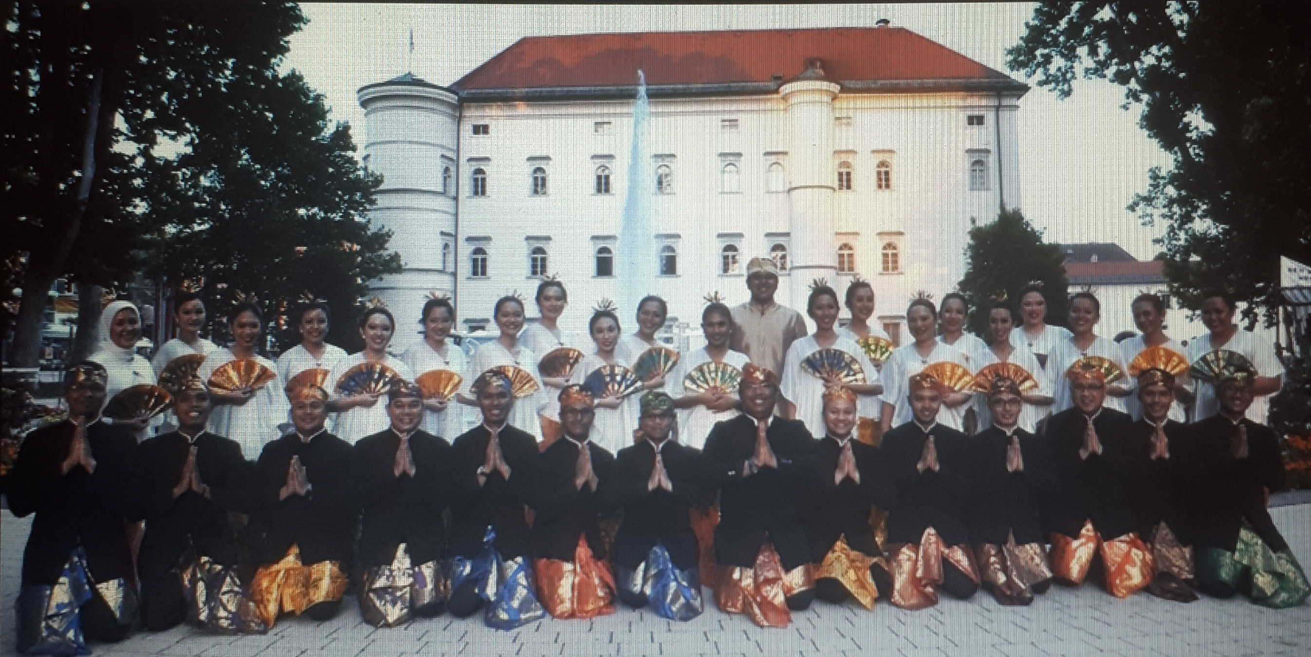 Kompetisi di Miltenberg